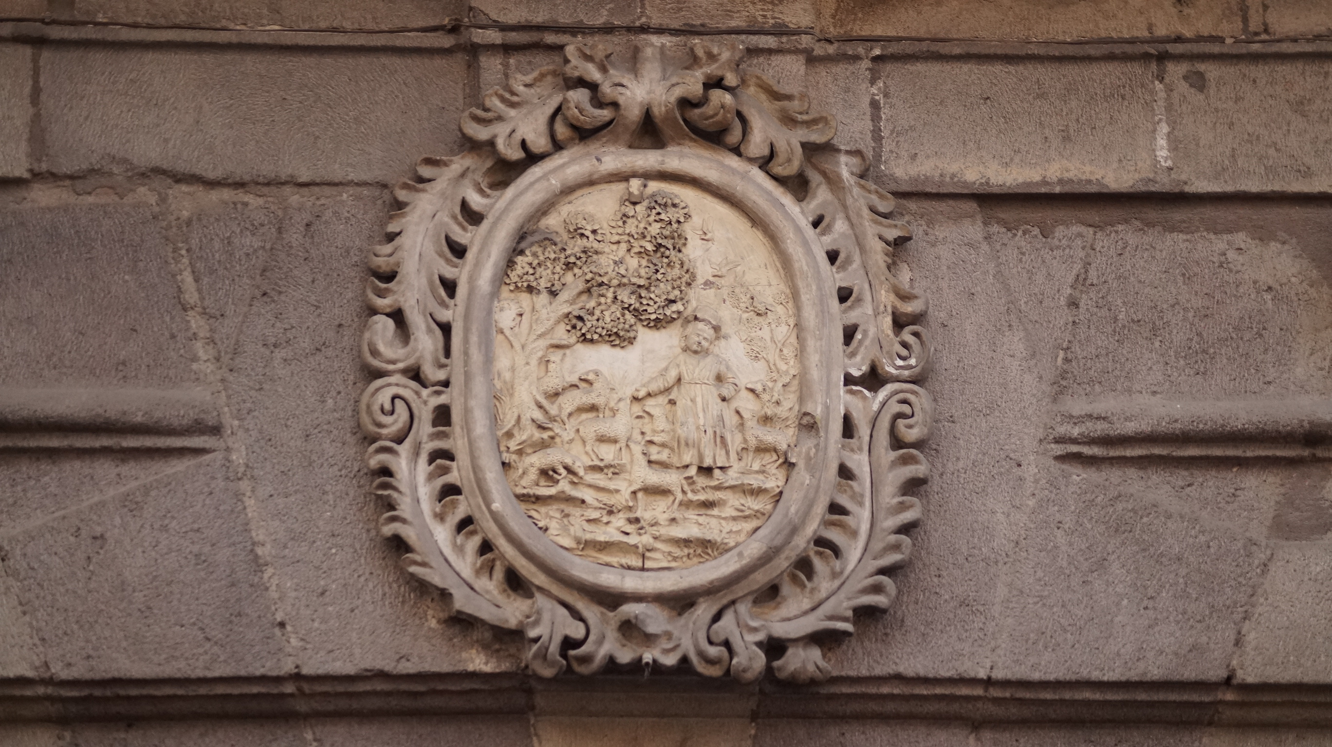 Escudo en el dintel de la Casa de las Bóvedas en Puebla, México.